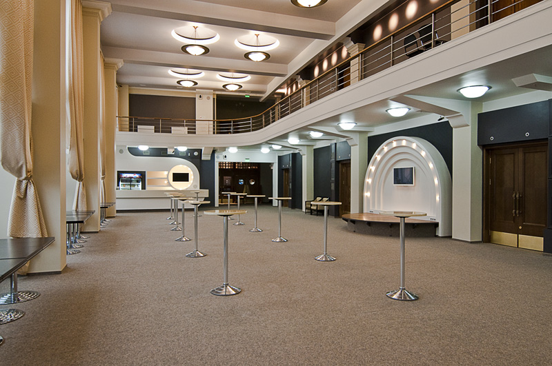 кафе на втором этаже театра мюзикла